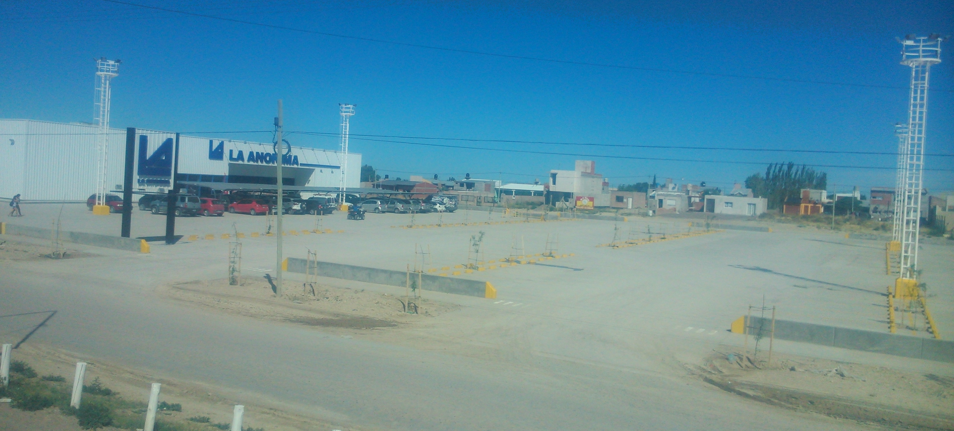 Supermercado La Anonima en Las Grutas